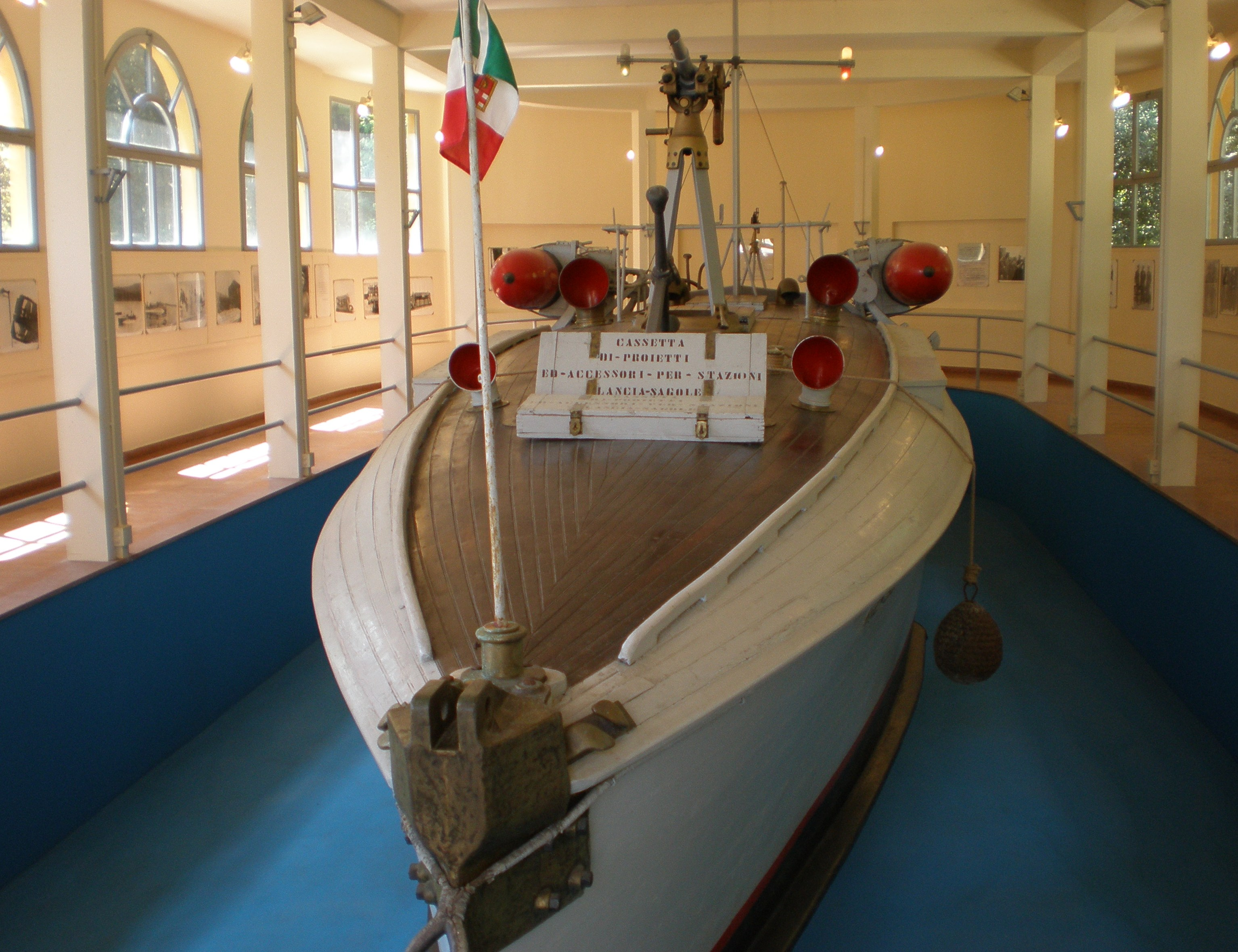 Torpedoboot Motoscafo Anti Sommergibile (MAS) im Vittoriale degli italiani in Gardone Riviera